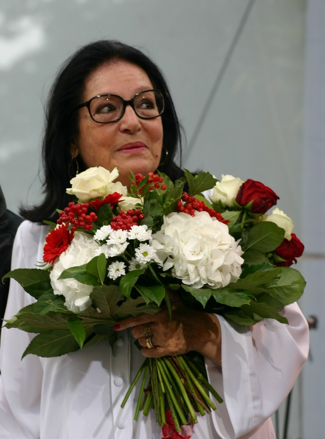 Die Sängerin Nana Mouskouri während eines Konzertes zum Tag der offenen Tür im Berliner Bundesfinanzministerium.